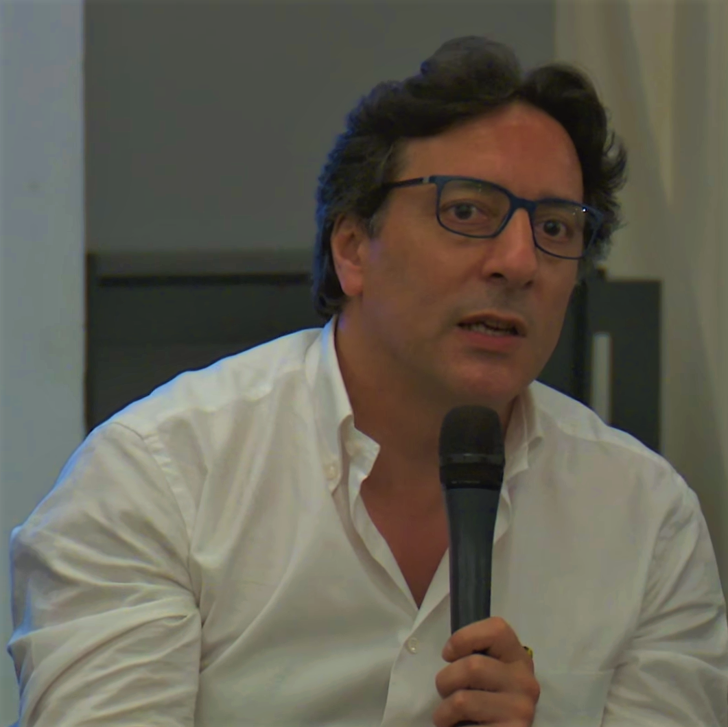 Arturo Di Corinto - convegno LIBERI DI ESSERE INFORMATI - Genova, 16 Giugno 2016